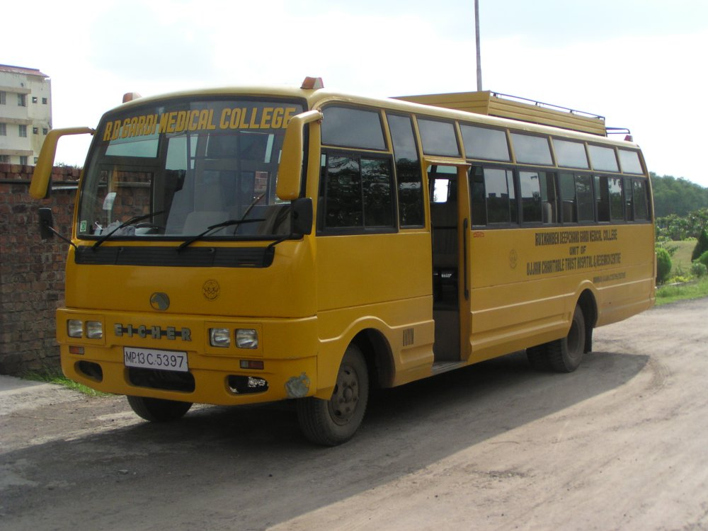 Omnibus der Eicher India